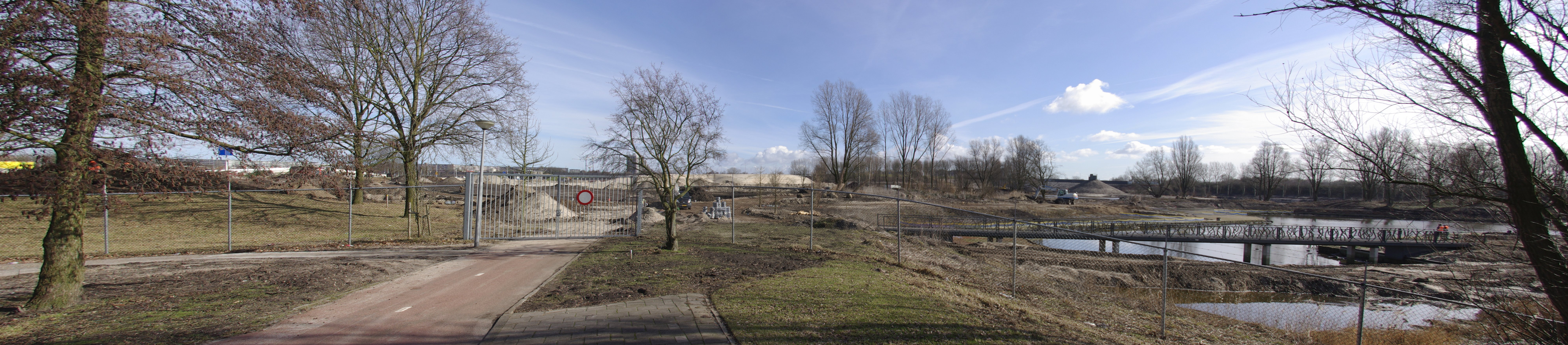 Bijlmerpark, Amsterdam Zuidoost